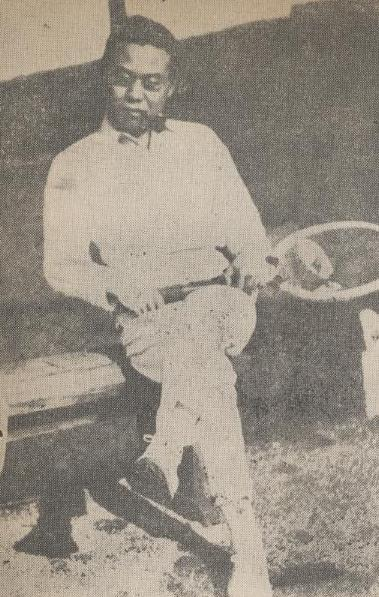 에든버러 대학 시절의 윤보선, 1920년대